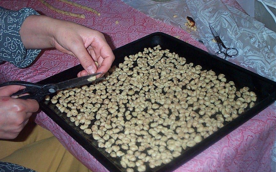 Plato marroquí 1